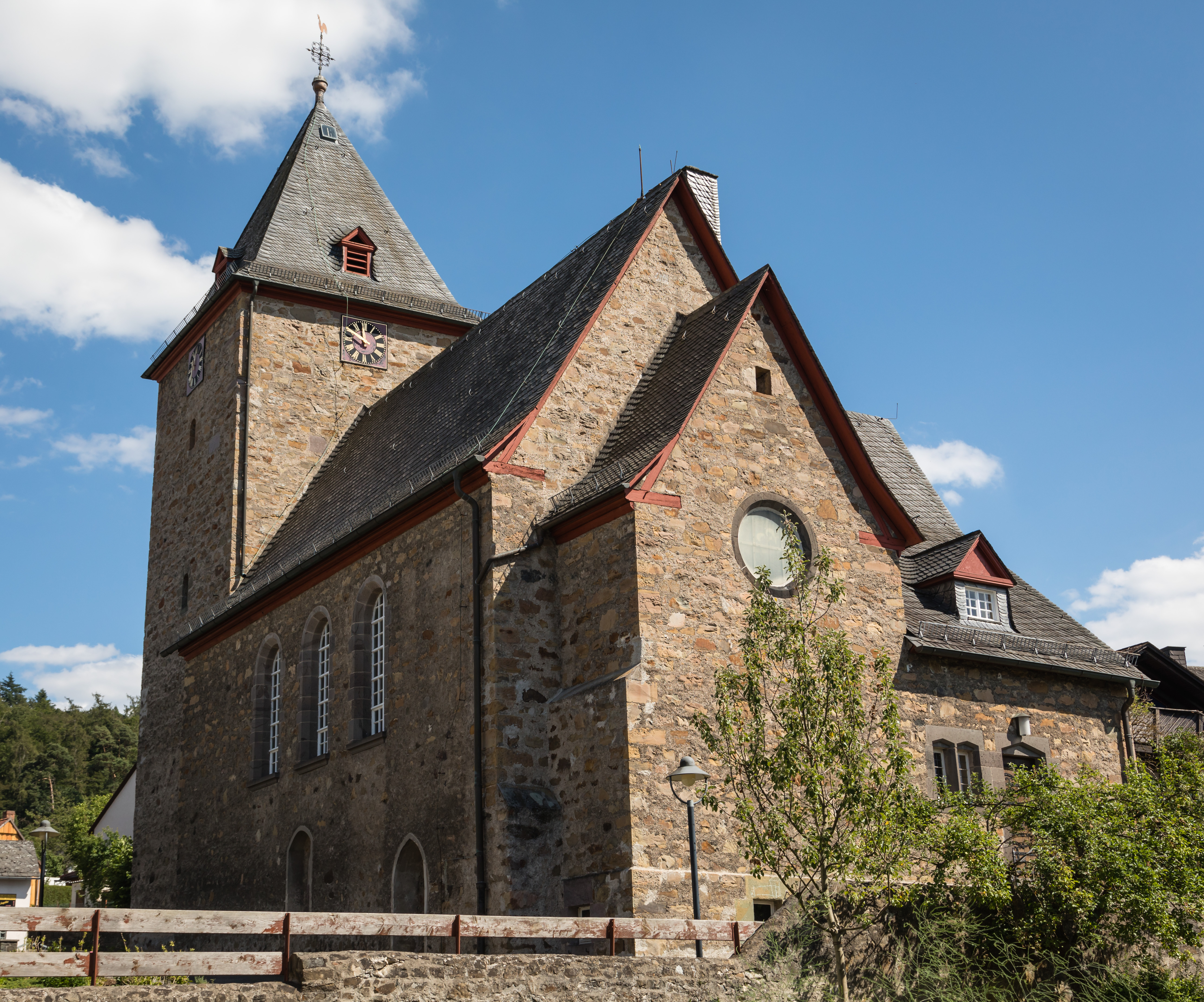 Ballersbache Kirche